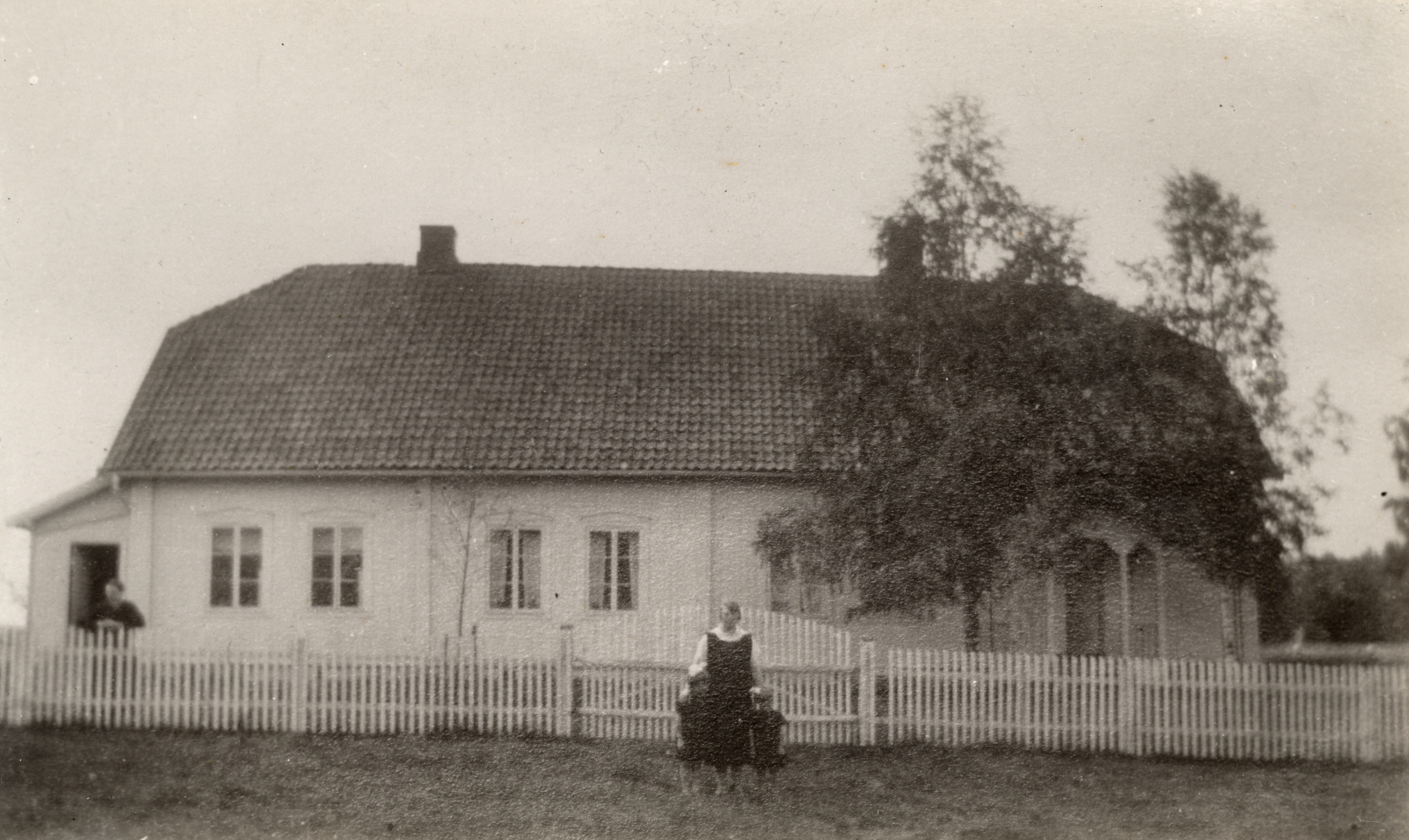 Sørum prestegård i Sørum, Akershus This image on crowdsourcing geotagging platform Fotodugnad